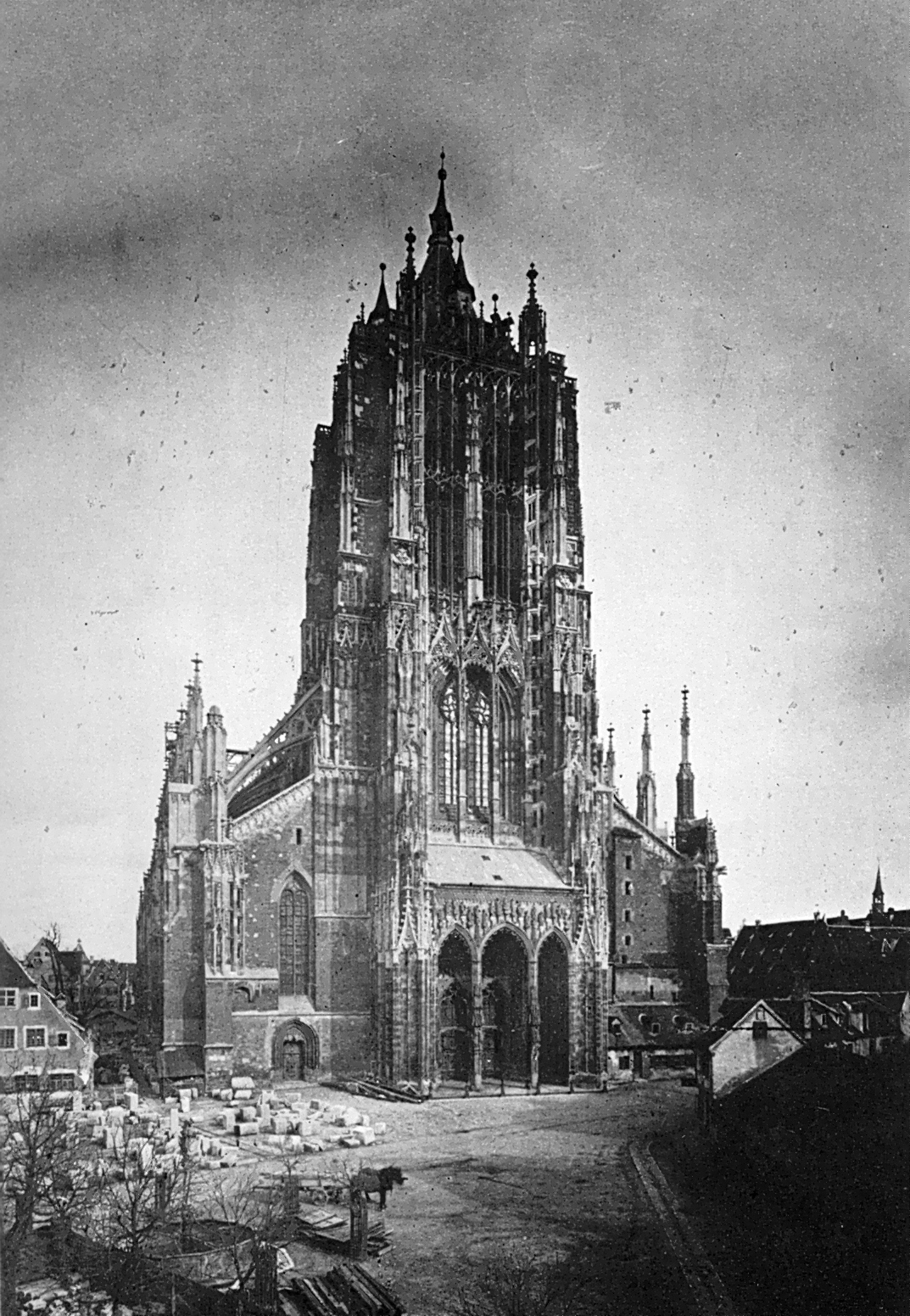 Ulmer Münster vor Vollendung des Turms, 1876, Sammlung Schwäbischer Baudenkmaleund Kunstarbeiten, 6, Münster zu Ulm, 205*209mm